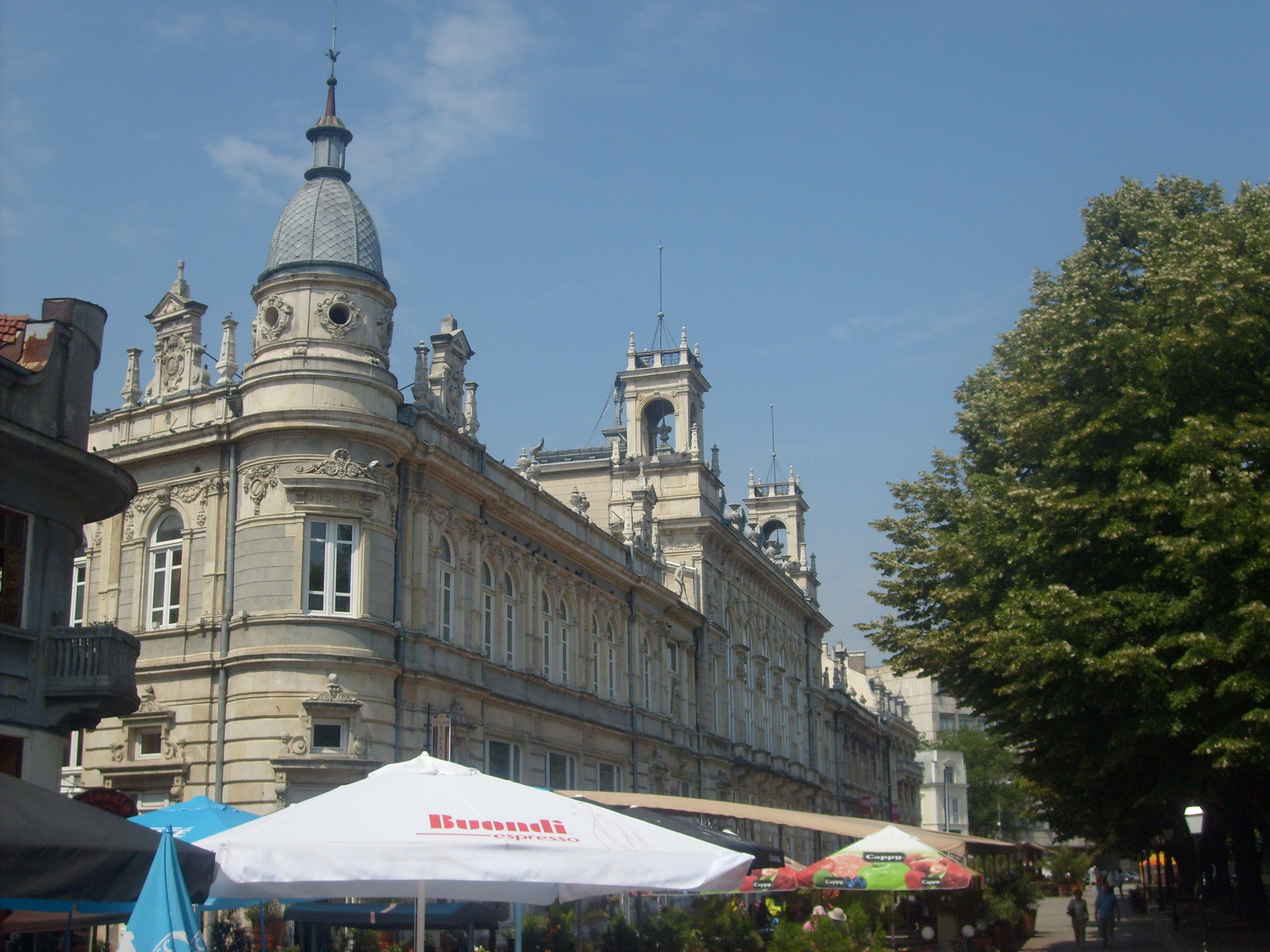 Ruse, Bulgaria Dohodno Zdanie